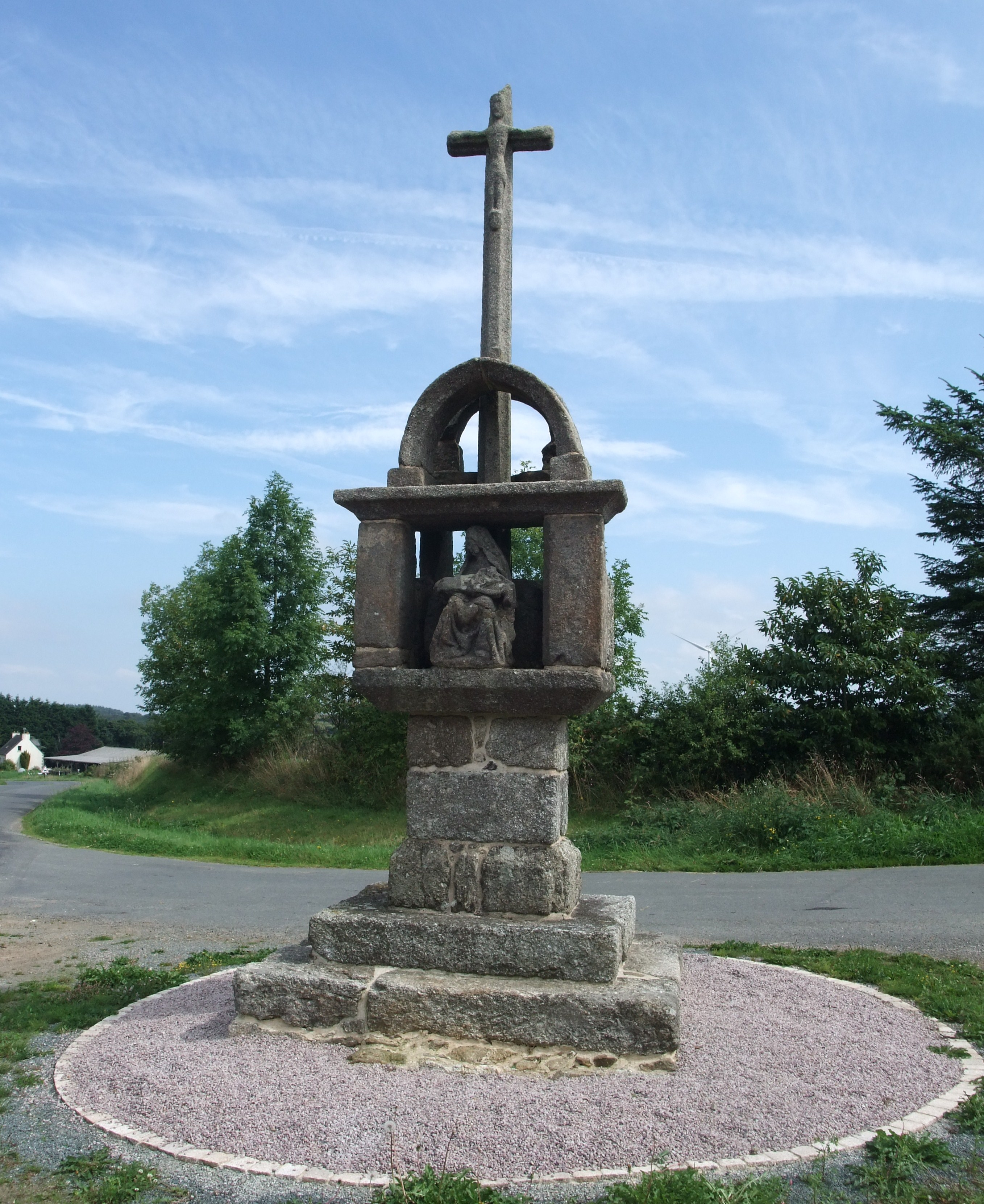 Important calvaire formant chapelle-niche, 16ème siècle, sur la commune de Pont-Melvez (Côtes d'Armor)